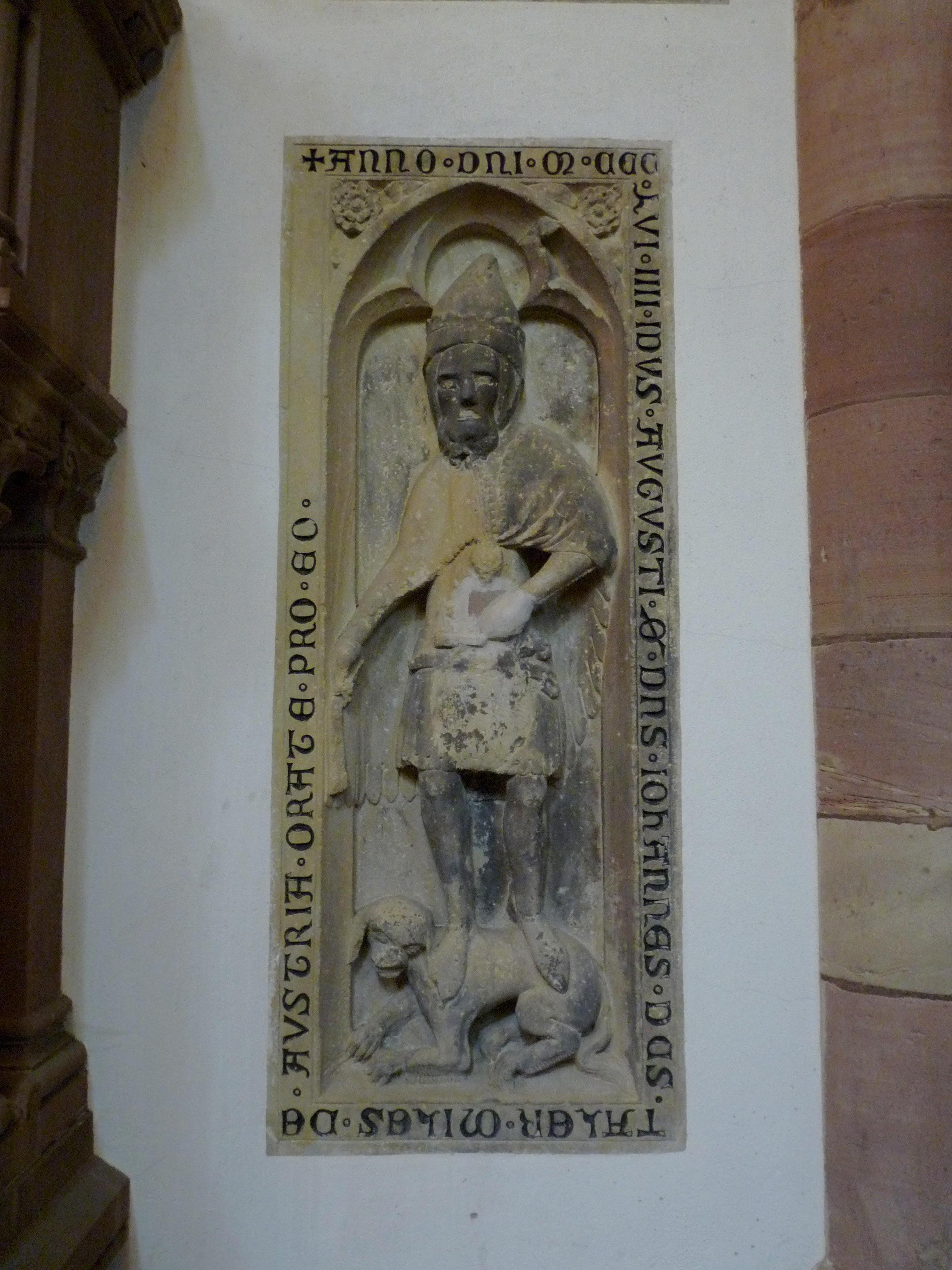 Pierre tombale de Jean Thaler (chevalier autrichien mort en 1356), à l'église Saint-Thomas de Strasbourg